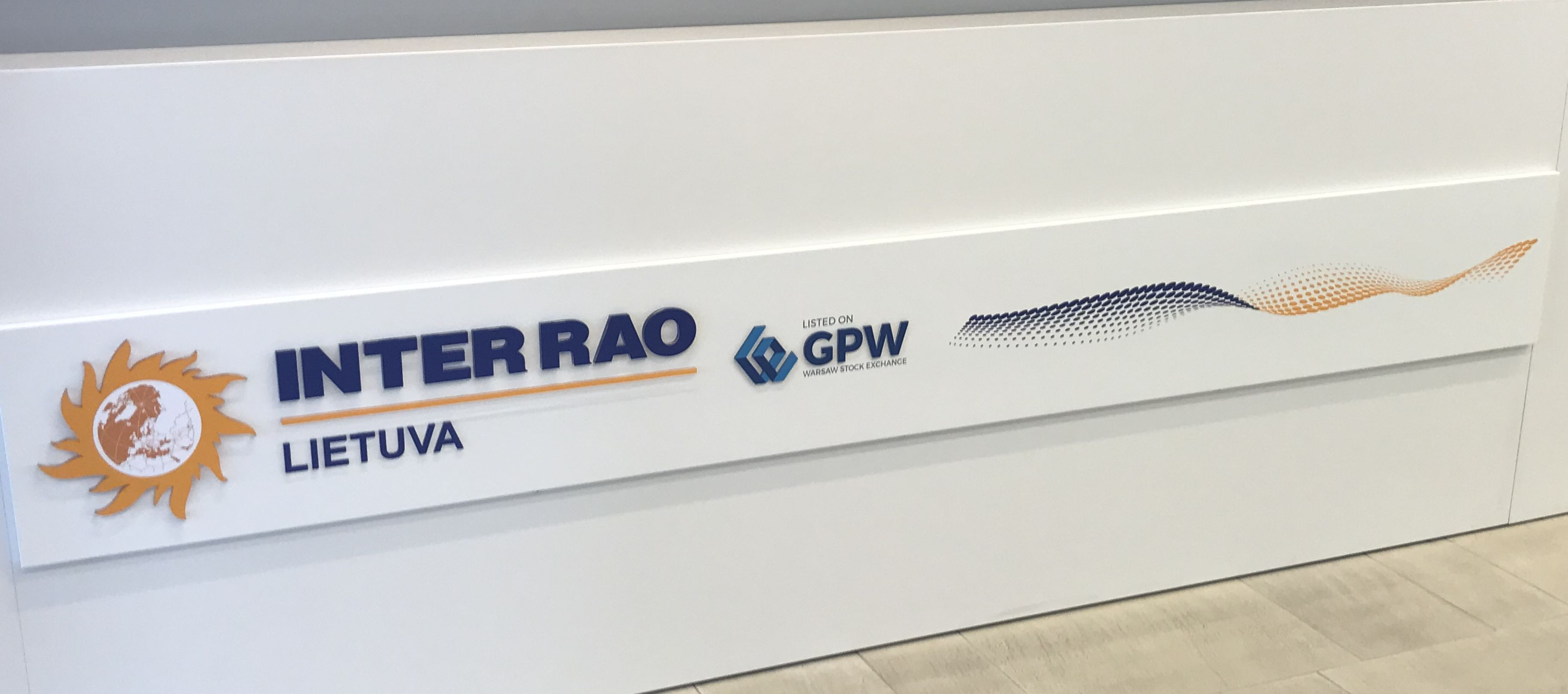 AB "INTER RAO Lietuva" biuras